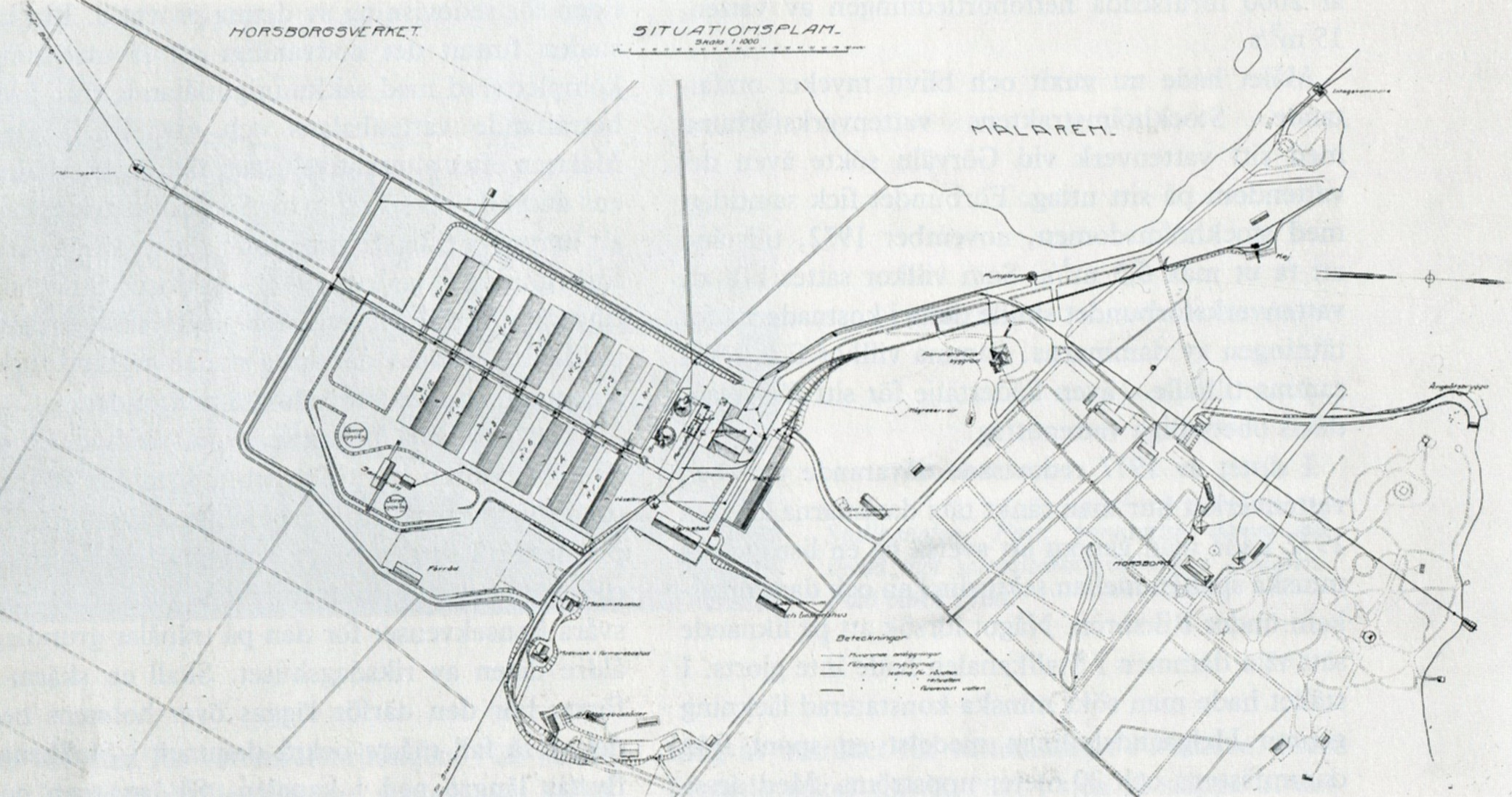 Norsborgs vattenverk, situationsplan